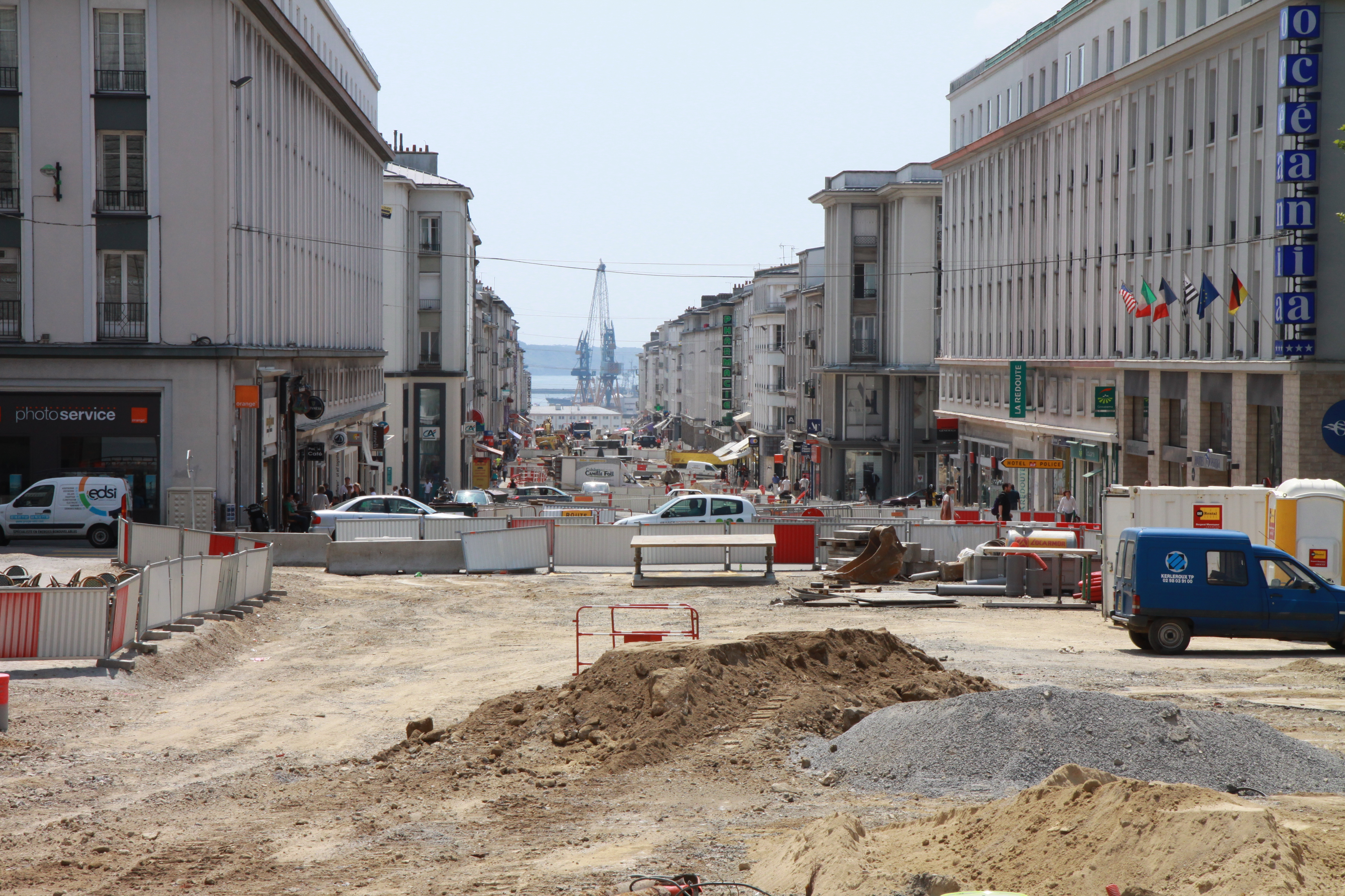 Travaux d'aménagement dans la rue de Siam pour l'arrivée du Tramway dans la ville en 2012.